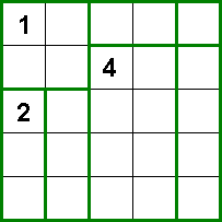 Egen teckning